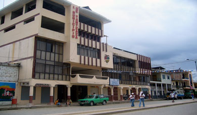 Ilustre Municipalidad de Yantzaza